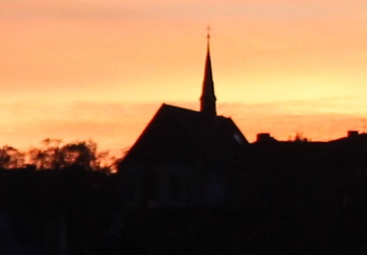 Die DIAKO-Kirche ein Teil der Stadtsilhouette Flensburgs, Bild 003